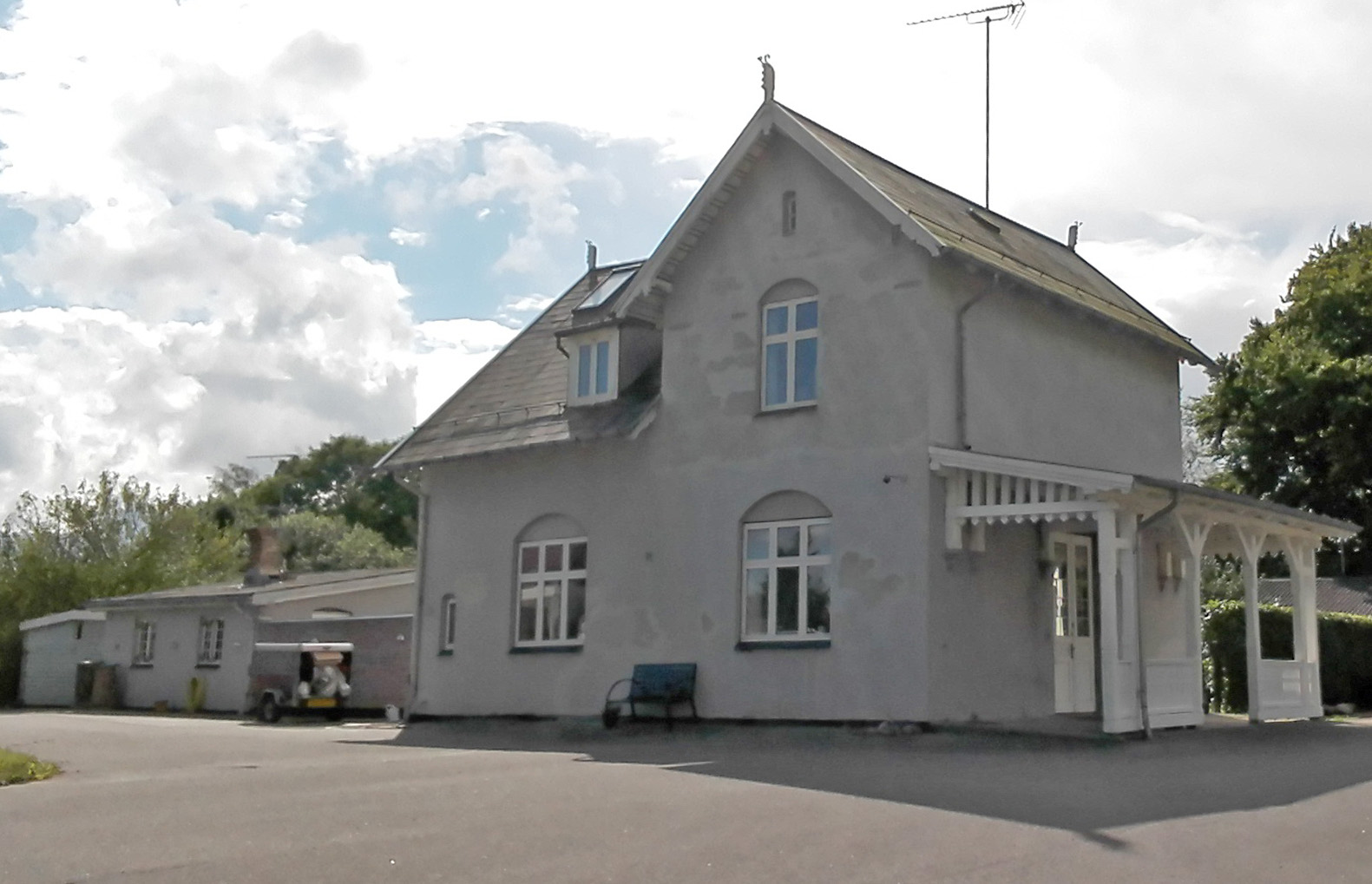 Hesselager Station fra vejsiden